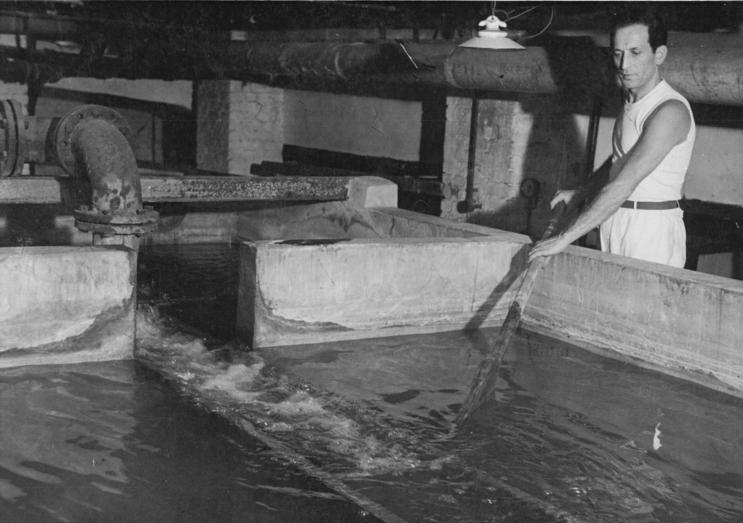 Title: Berlin-Lichtenberg, Schwimmbad, Bademeister Factual corrections and alternative descriptions are encouraged separately from the original description. Additionally errors can be reported at this page to inform the Bundesarchiv. Original historic description: Aus der Arbeit eines Schwimmeisters. UBz: Die Arbeit eines Schwimmeisters im Berliner Stadtbad Lichtenberg. Früh wird das Wasser gereinigt. Die Hauptabsonderungen, die sich im Laufe eines Tages absetzen, müssen entfernt werden. Diese Arbeit bezeichnet man als Keschern. Aufn.: Illus-Köhler 1 Leu. 5566-50 Febr. 50